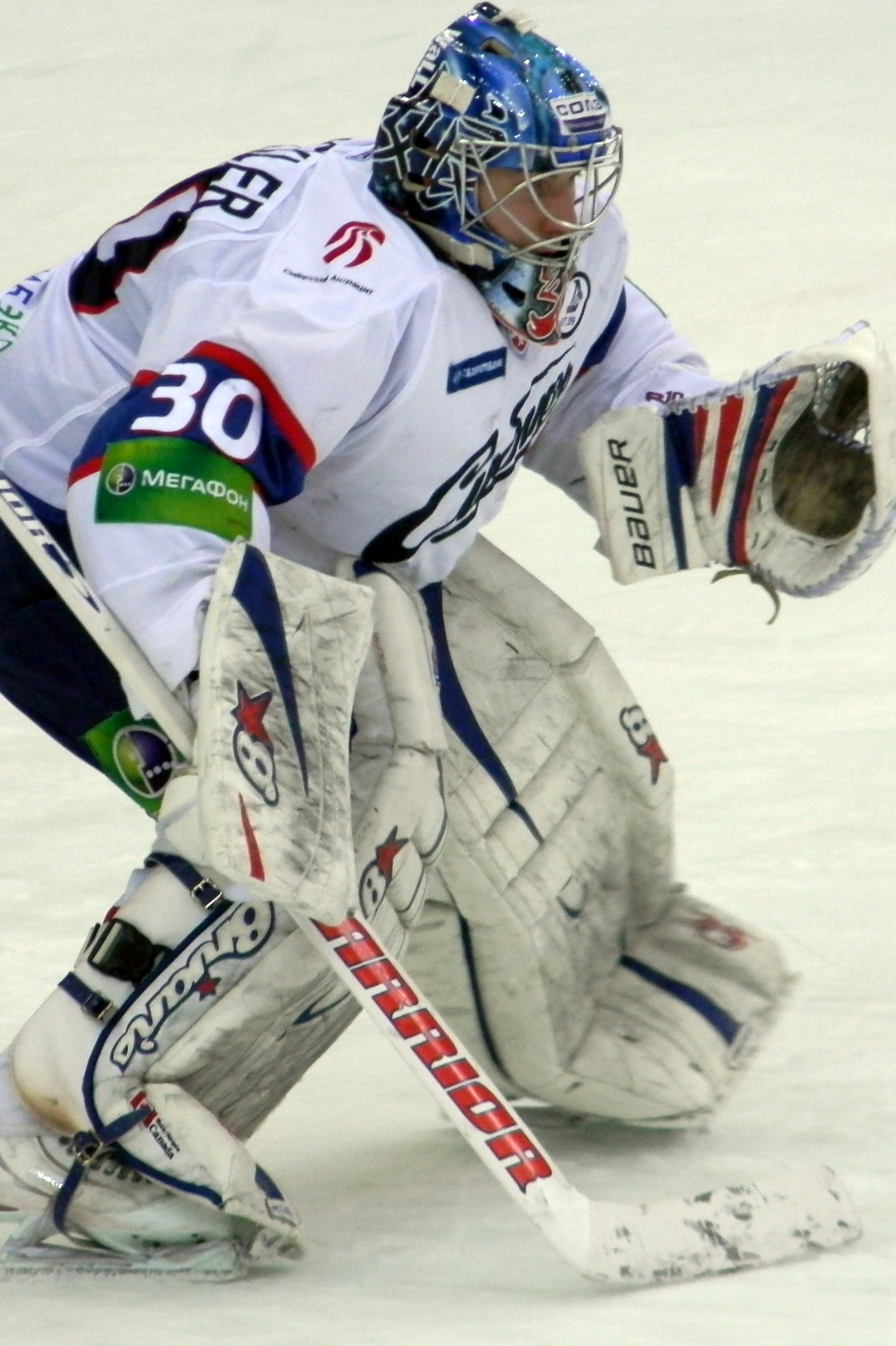 Bernd Brückler, an ice-hockey goaltender from HC Sibir Novosibirsk